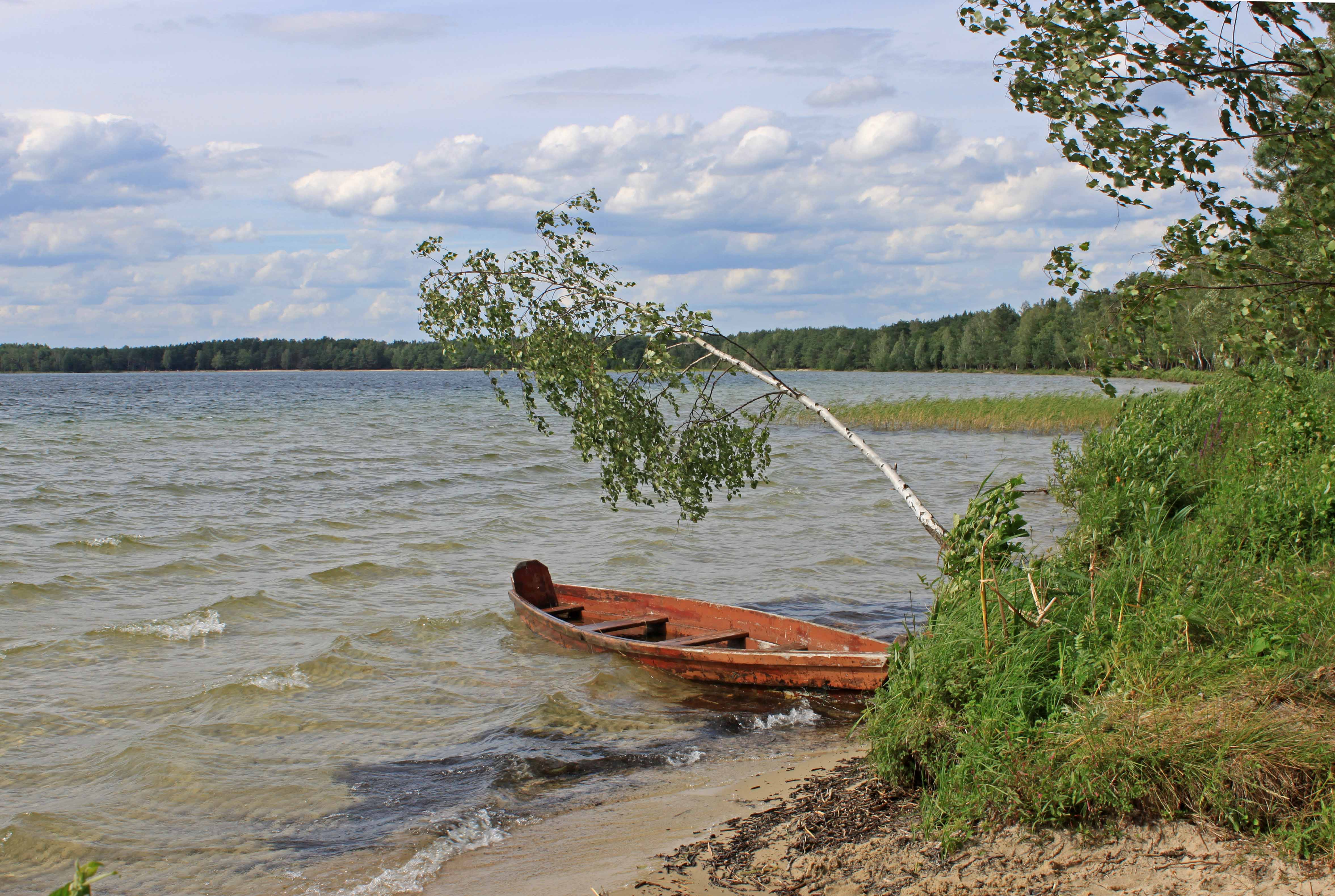 Шацький національний природний парк